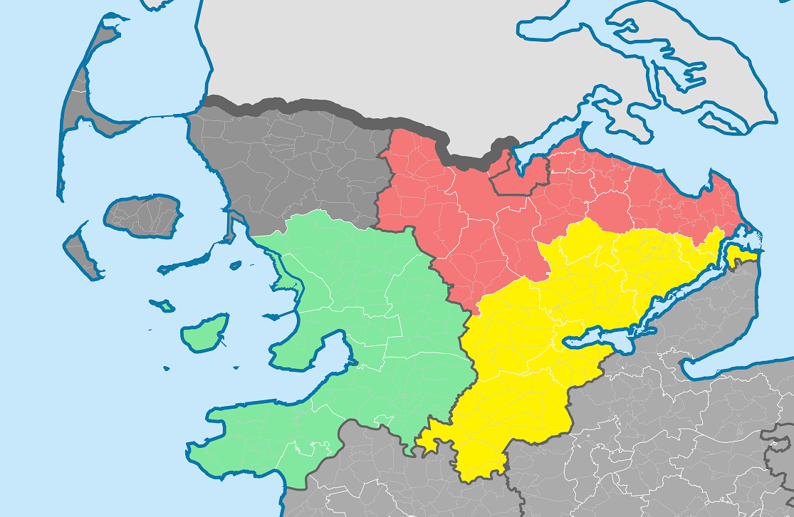 Karte der Amtsgerichtsbezirke im Landgerichtsbezirk Flensburg Amtsgericht Niebüll Amtsgericht Flensburg Amtsgericht Husum Amtsgericht Schleswig